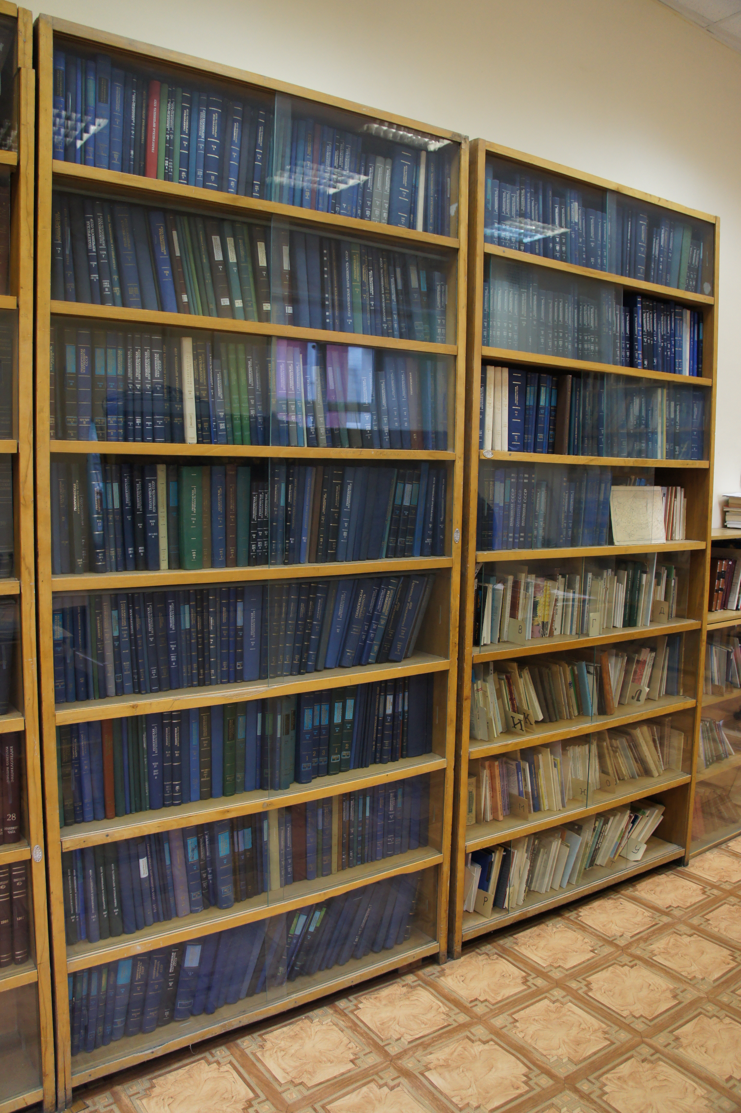 Тома геологической изученности СССР, составленные Комиссией по геологической изученности СССР (КОГИ)